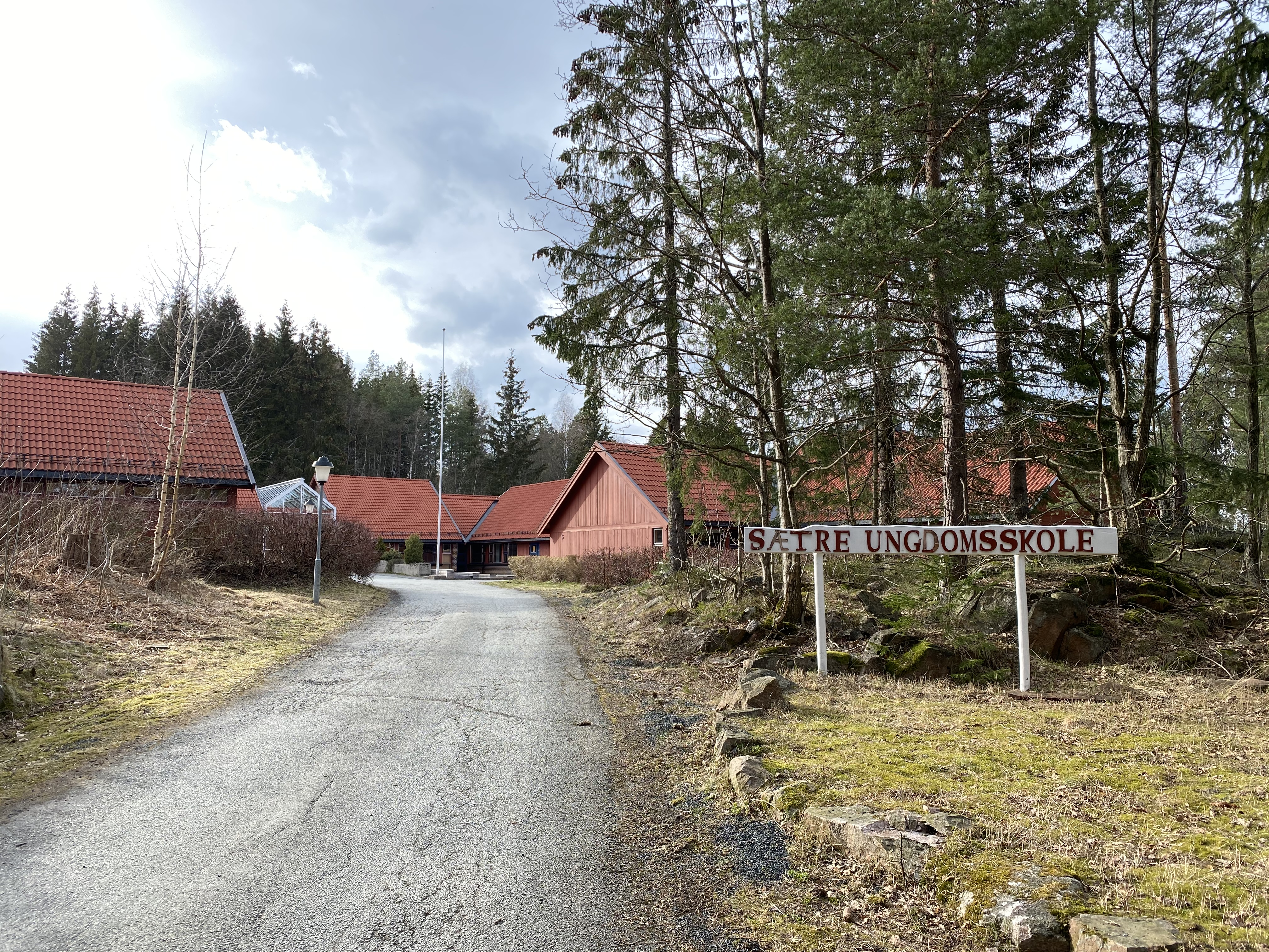 Inngangen til Sætre ungdomsskole, Asker.